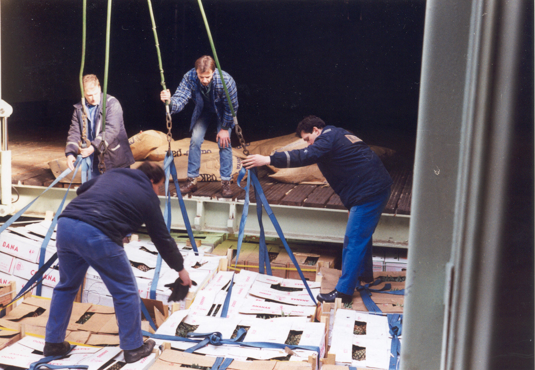 Stauer bei Löscharbeiten auf der Crystal Primadonna